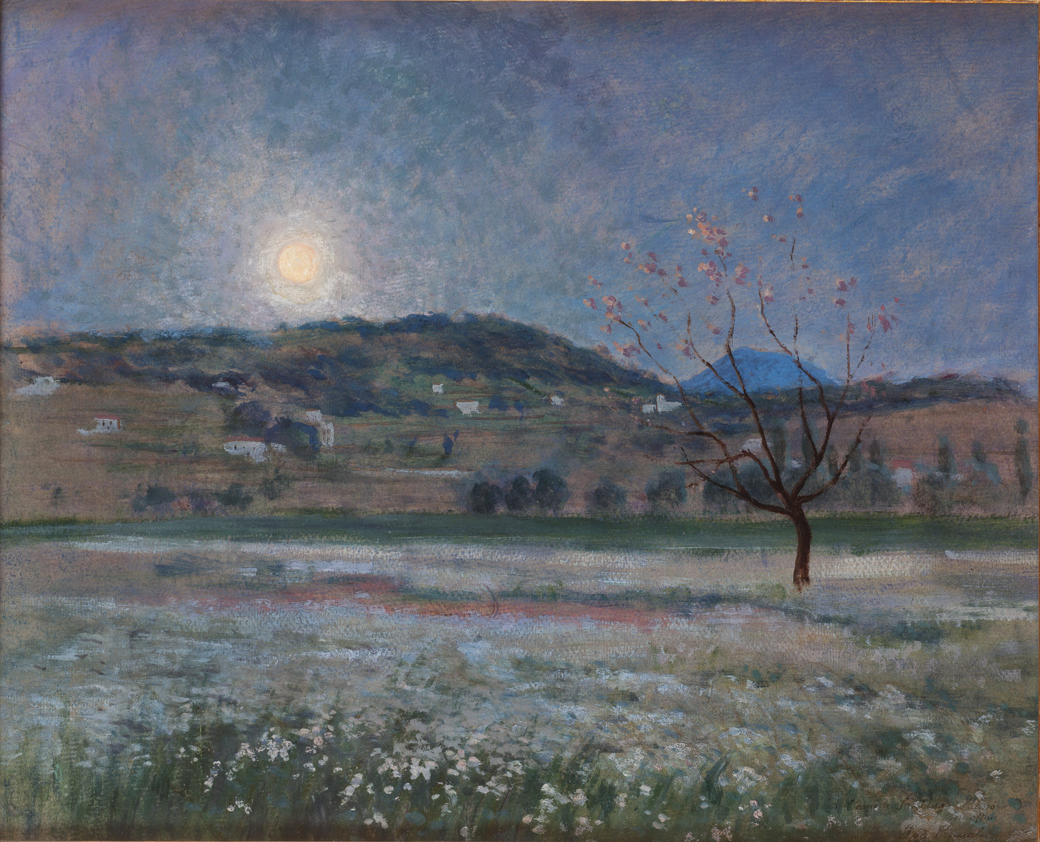 Quadre Nit de Lluna a la Garrotxa, pintat per Iu Pascual entorn a 1920